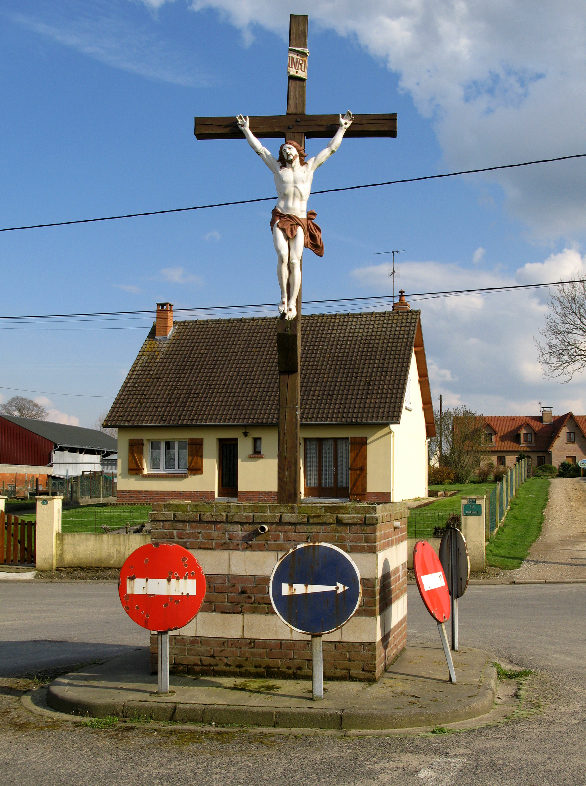 Franleu (Somme, France) - Le calvaire.